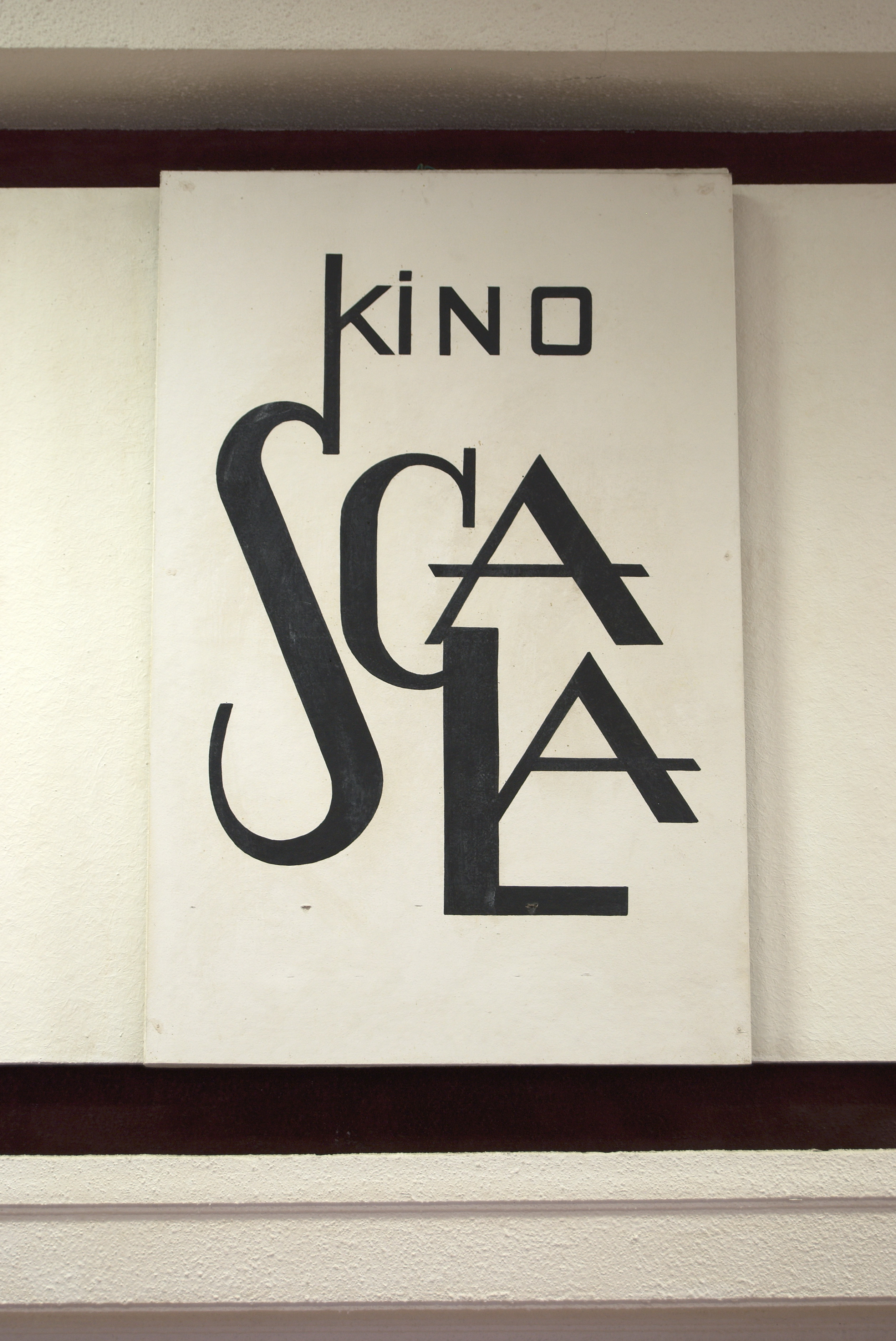 Brněnské kino Scala - logo kina za vstupem nad prostorem s pokladnami